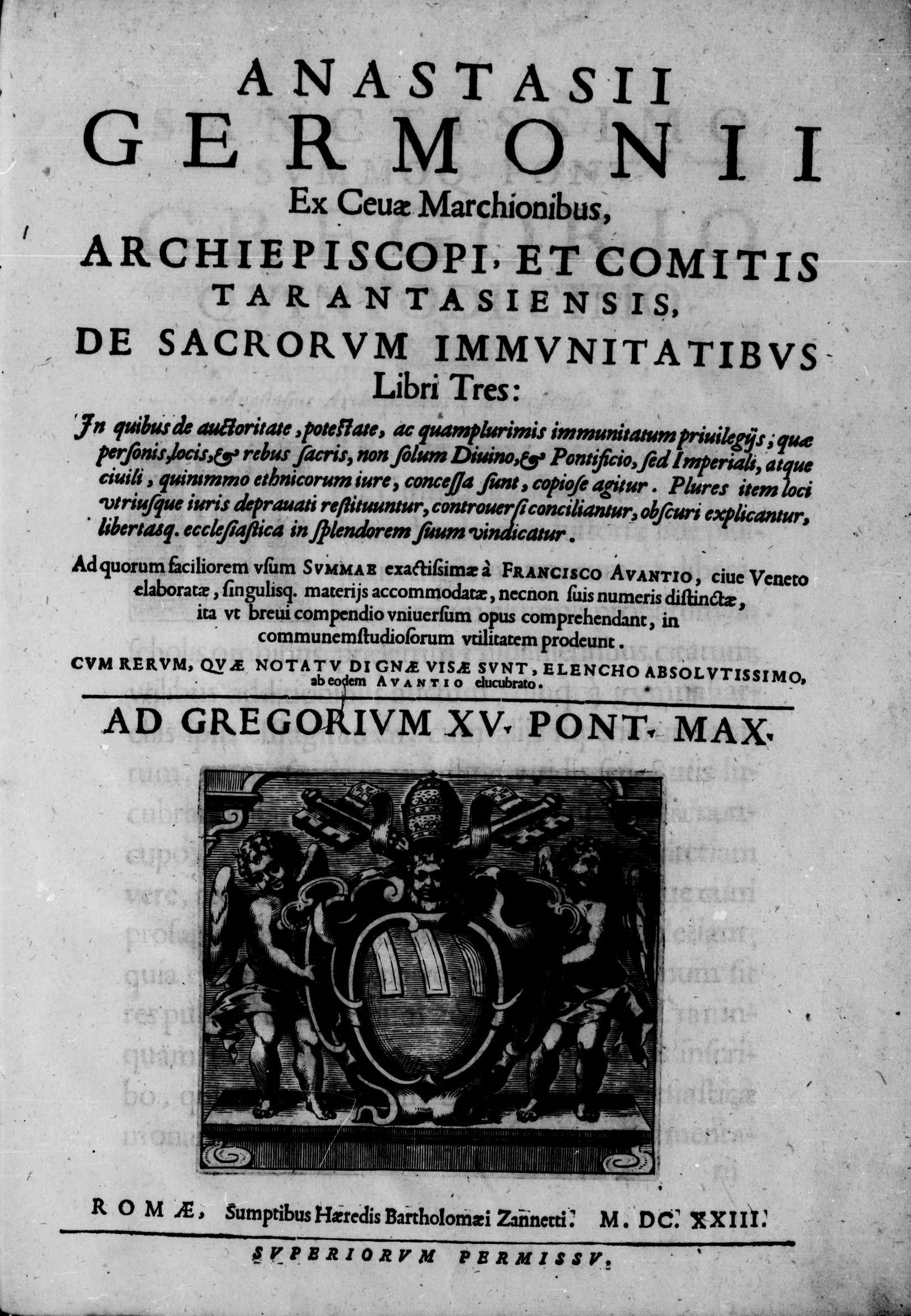 Frontespizio